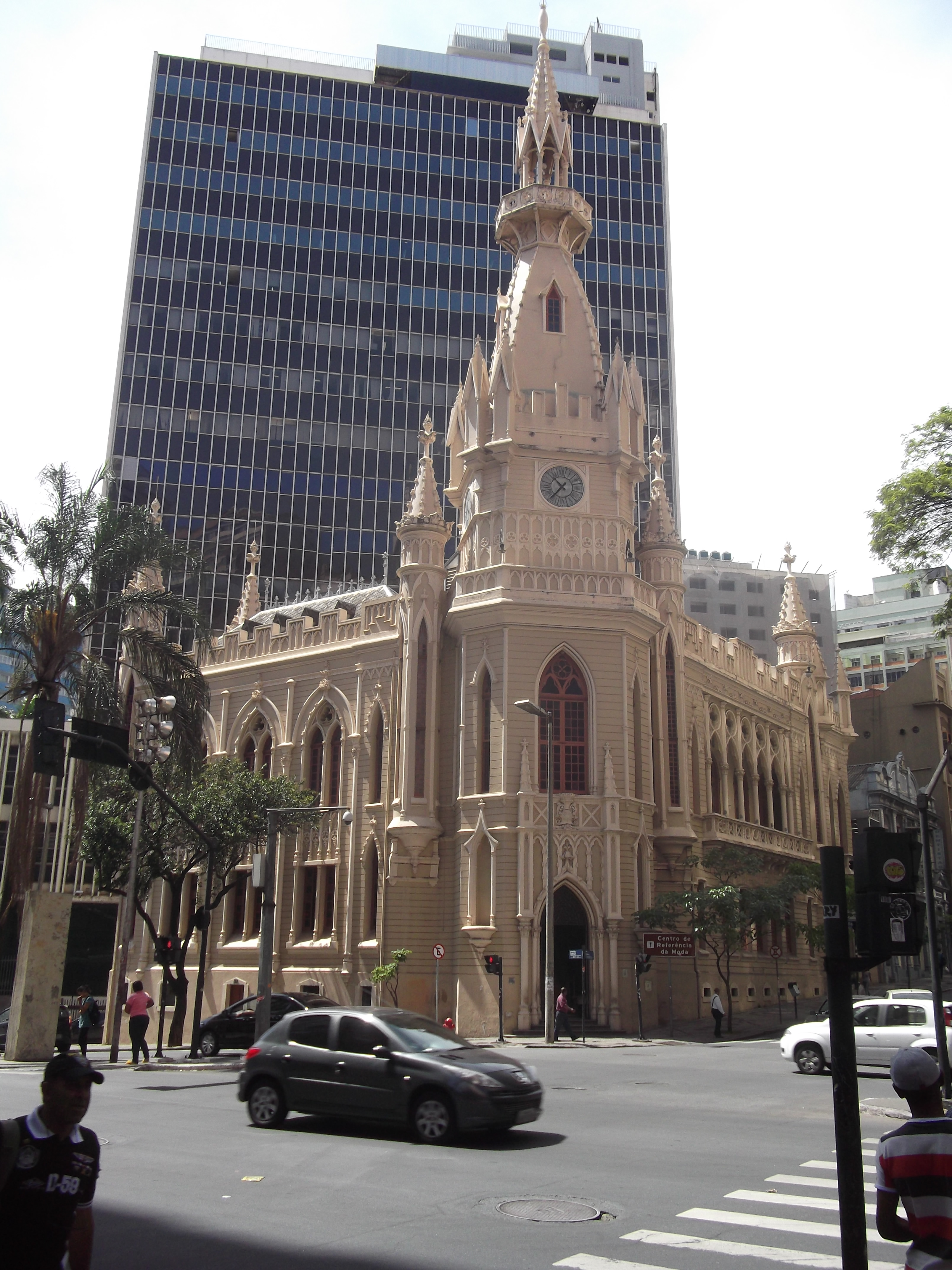 Centro de Referência da Moda, Belo horizonte, Brasil